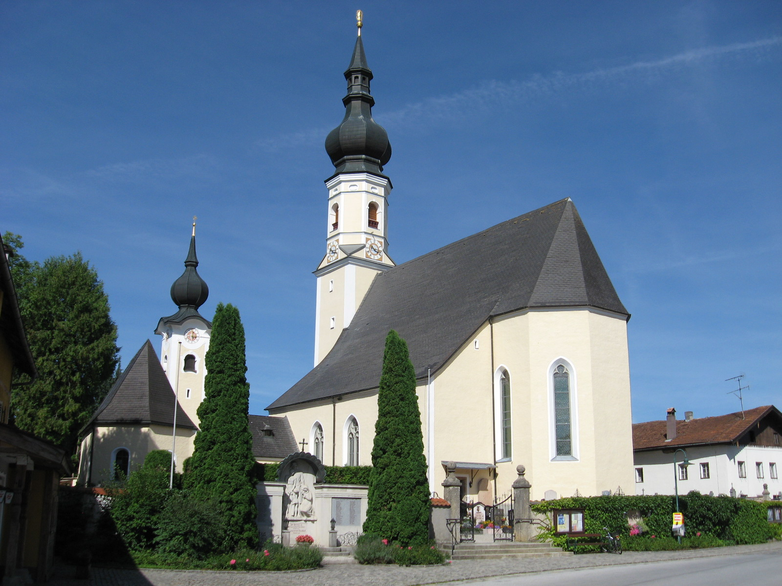 Barockkirche in Berndorf bei Salzburg